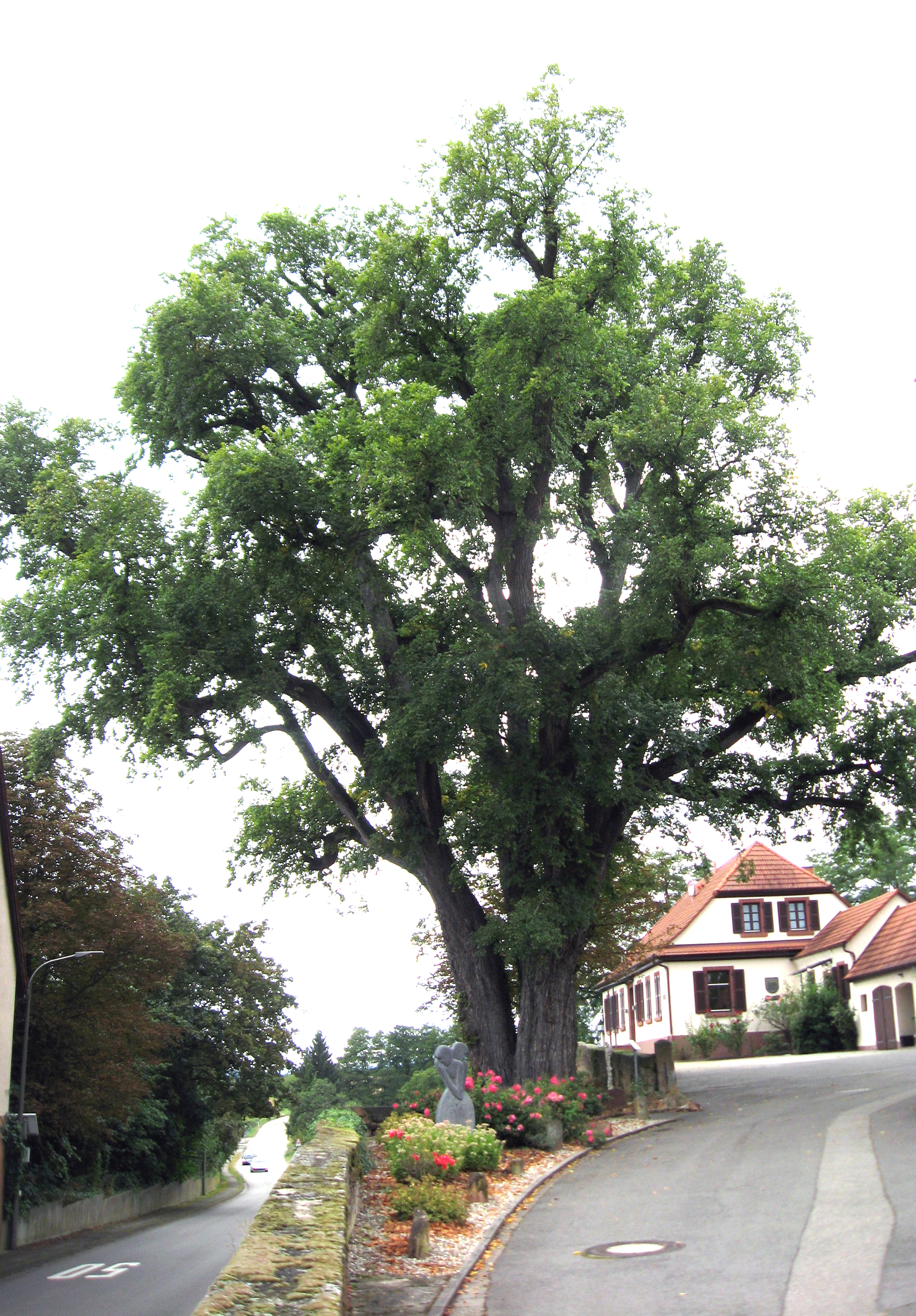 Bergulme (Ulmus glabra) bei Kirchgasse 2 in Minfeld; eine der letzten ihrer Art in Deutschland